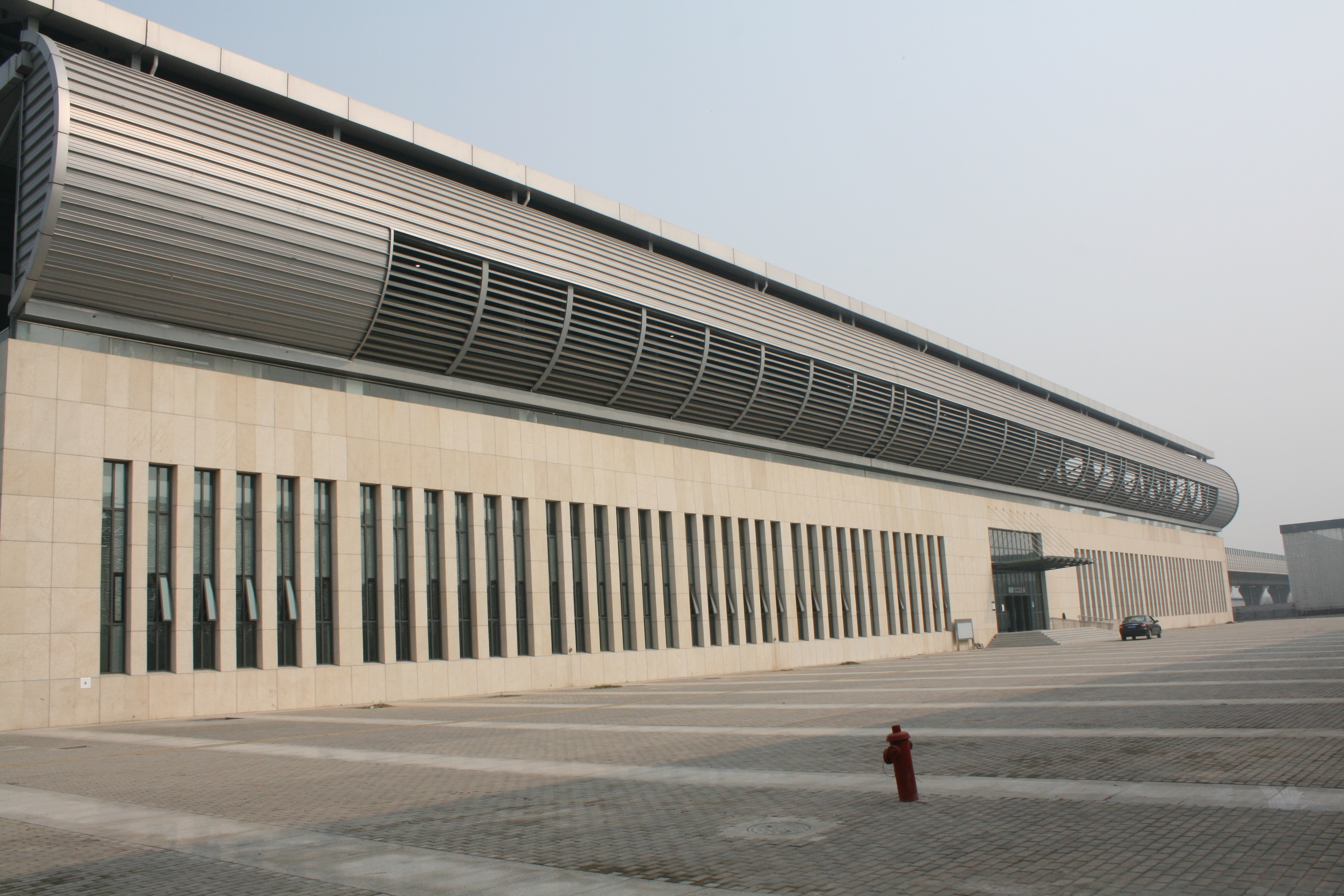 天津地鐵三號線豐產河站體 0001